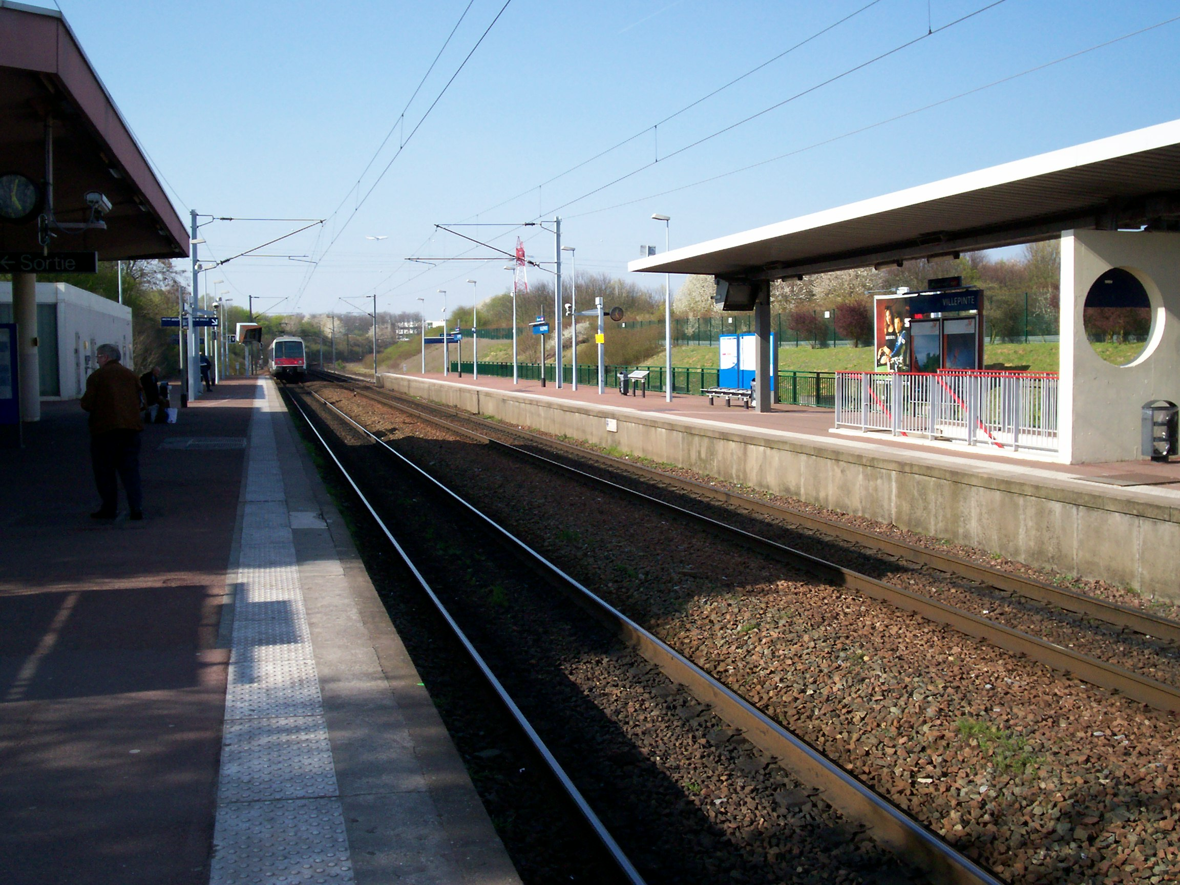 Quais de la gare de Villepinte